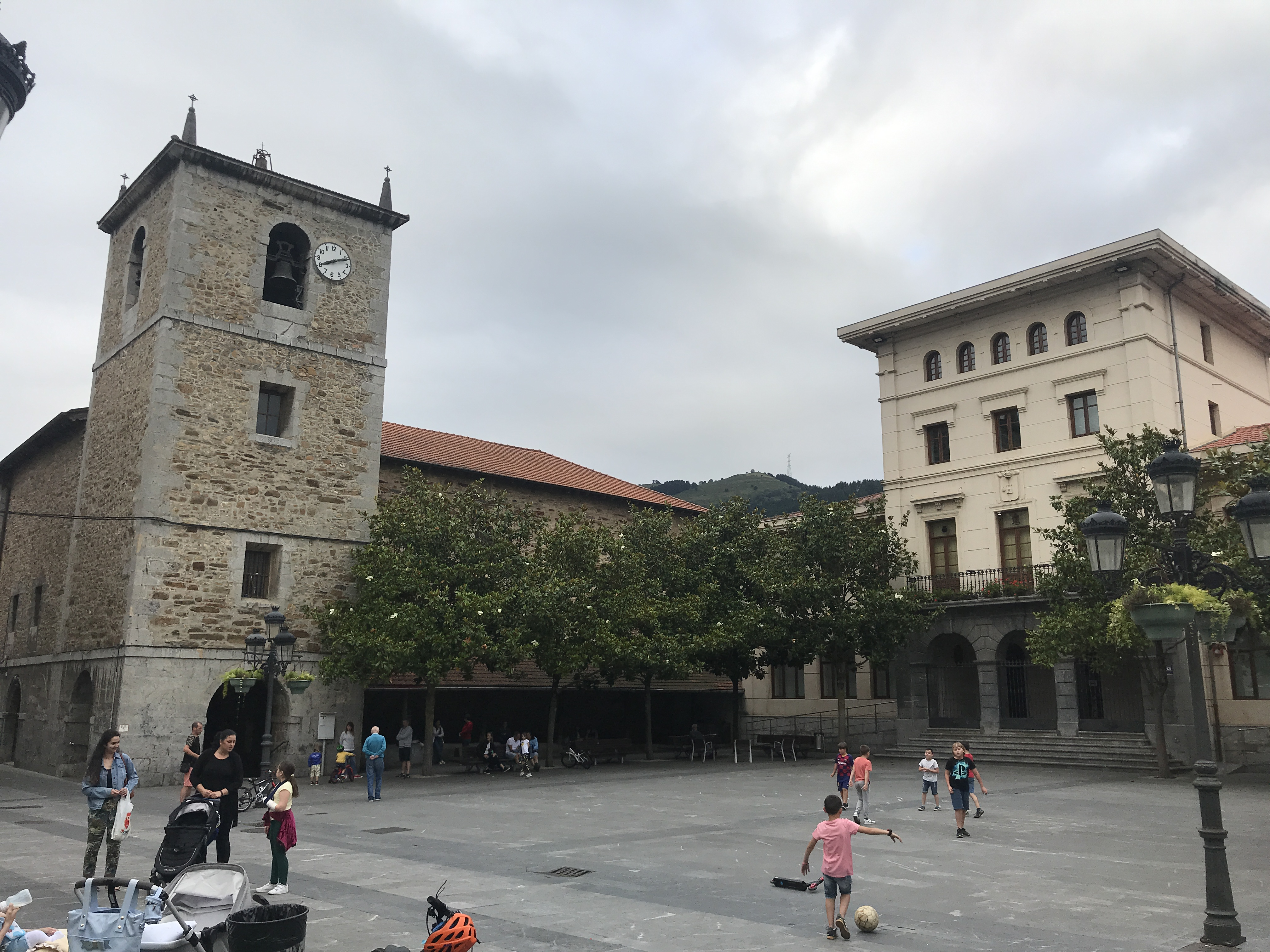 Vista parcial de Herriaren Plaza de Ugao-Miraballes en Bizkaia, País Vasco (España), con la iglesia de San Bartolomé y la casa consistorial.